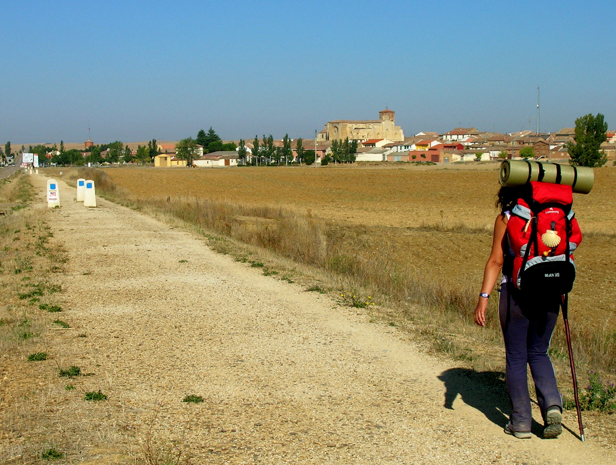 A tan solo 6 kilometros de Carrión de los Condes, se encuentra este pueblo con su impresionante iglesia templaria del siglo XIII.